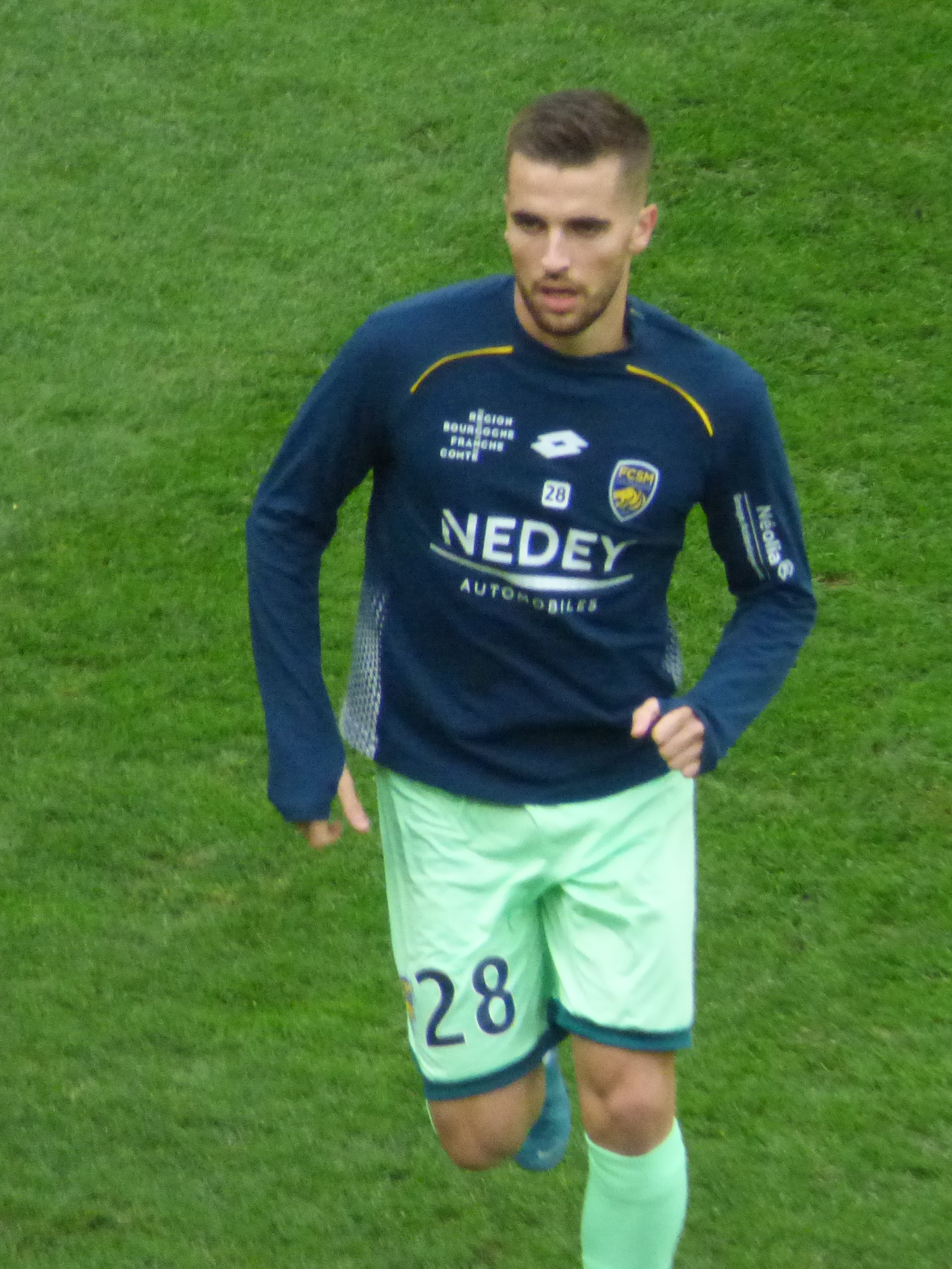 Gaëtan Weissbeck avant le match RC Lens / FC Sochaux, comptant pour la quinzième journée du championnat de France de Ligue 2 de football 2019-2020, le 23 novembre 2019, au Stade Bollaert-Delelis.